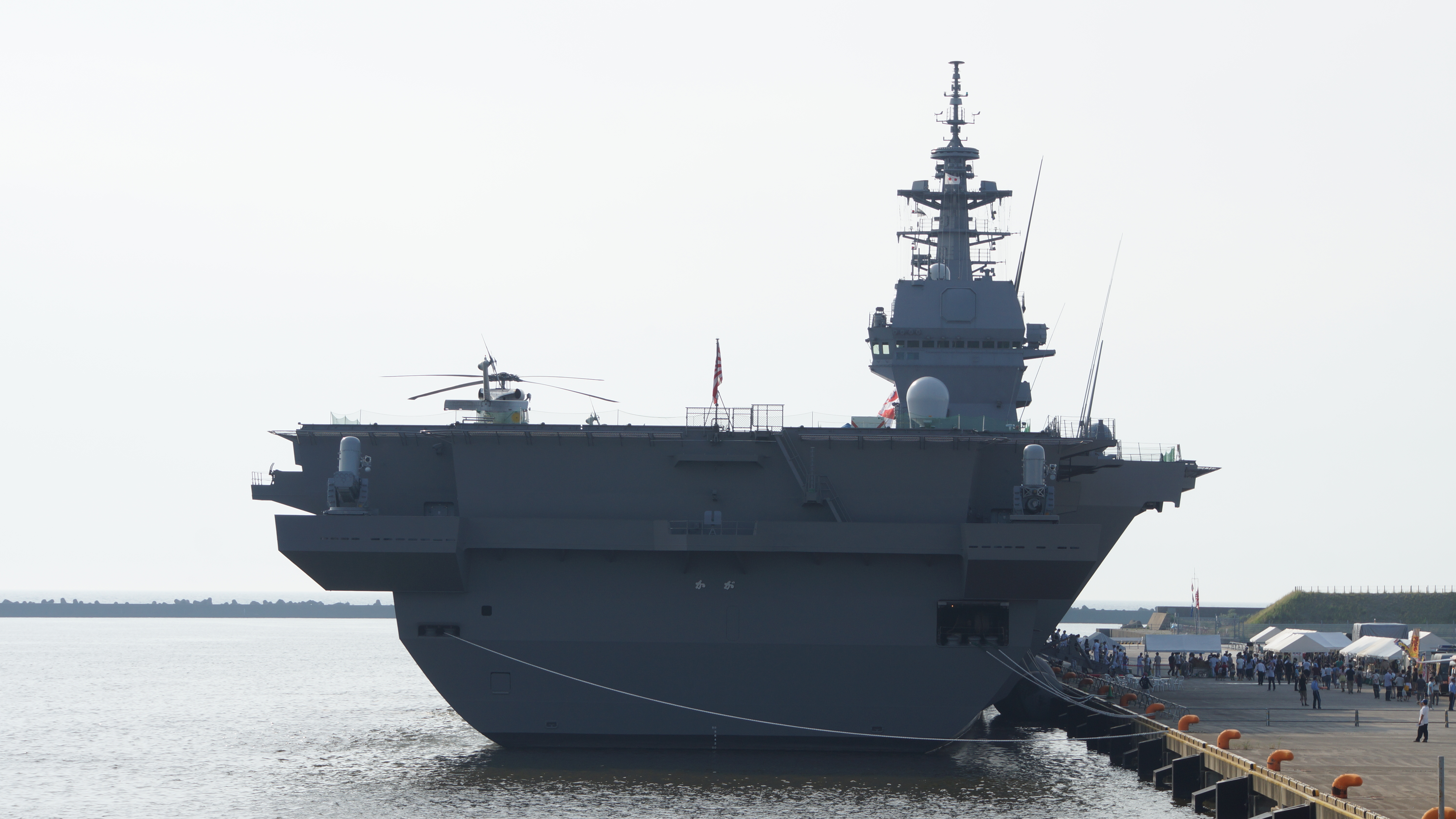 海上自衛隊 ヘリコプター搭載護衛艦かが（DDH-184） 後面。2017年7月15日 金沢港にて。